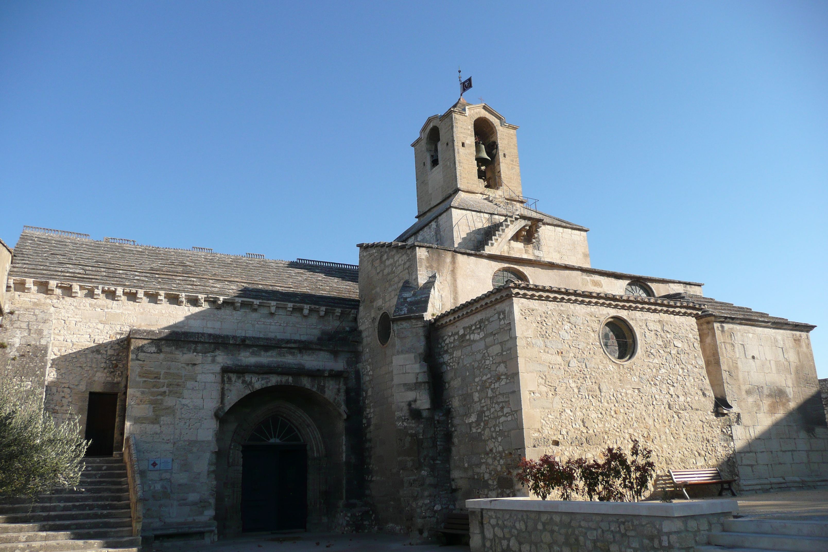 Eglise Noves.